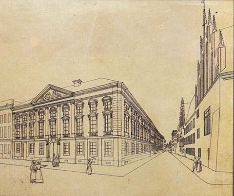 Collegium Physicum (Kołłątaja) przy_ul. św. Anny. Ryt. Piotr Wroński, wg rys. A. Bakałłowicza, I poł. XIX wieku